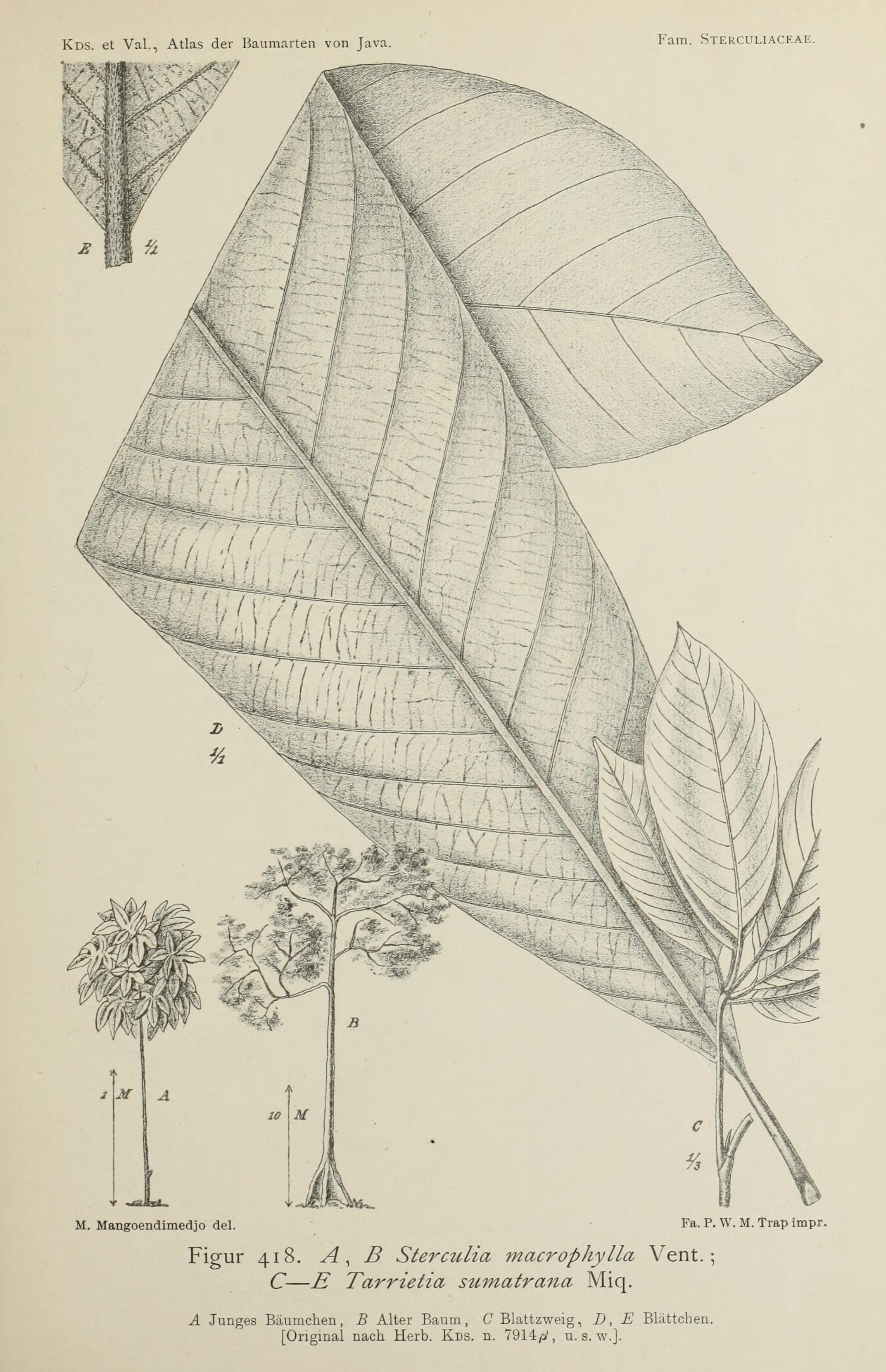 Atlas der baumarten von Java : im anschluss an die "Bijdragen tot de kennis der boomsoorten van Java" / zusammengestellt von dr. S.H. Koorders und dr. Th. Valeton ; mit unterstützung der Niederländsch- indischen regierung ; Herausgegeben von dr. S.H. Koorders.